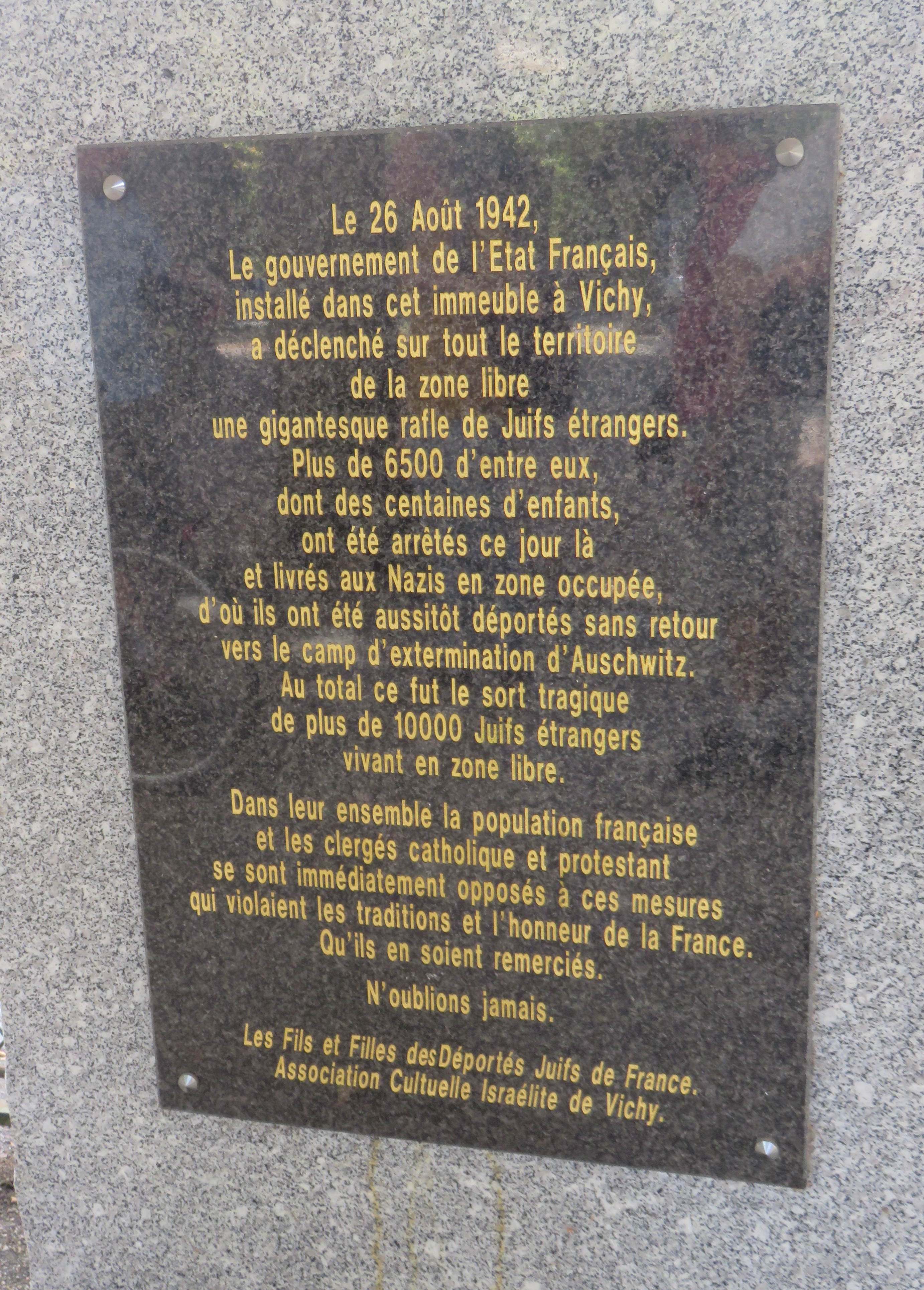 Plaque commémorative de la rafle du 26 août 1942, où le gouvernement de l'Ètat français a arrêté des milliers de Juifs afin de les livrer aux Nazis. Cette plaque est située sous la galerie couverte, rue du parc, devant l'hôtel du même nom, ancien siège du gouvernement de l'État français entre 1940 et 1944 à Vichy (Allier, France).